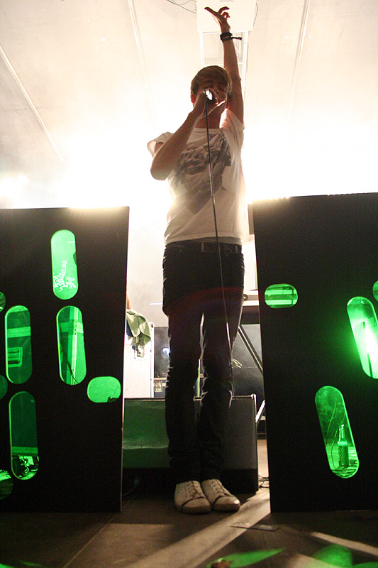 digitalism live at melt 2007